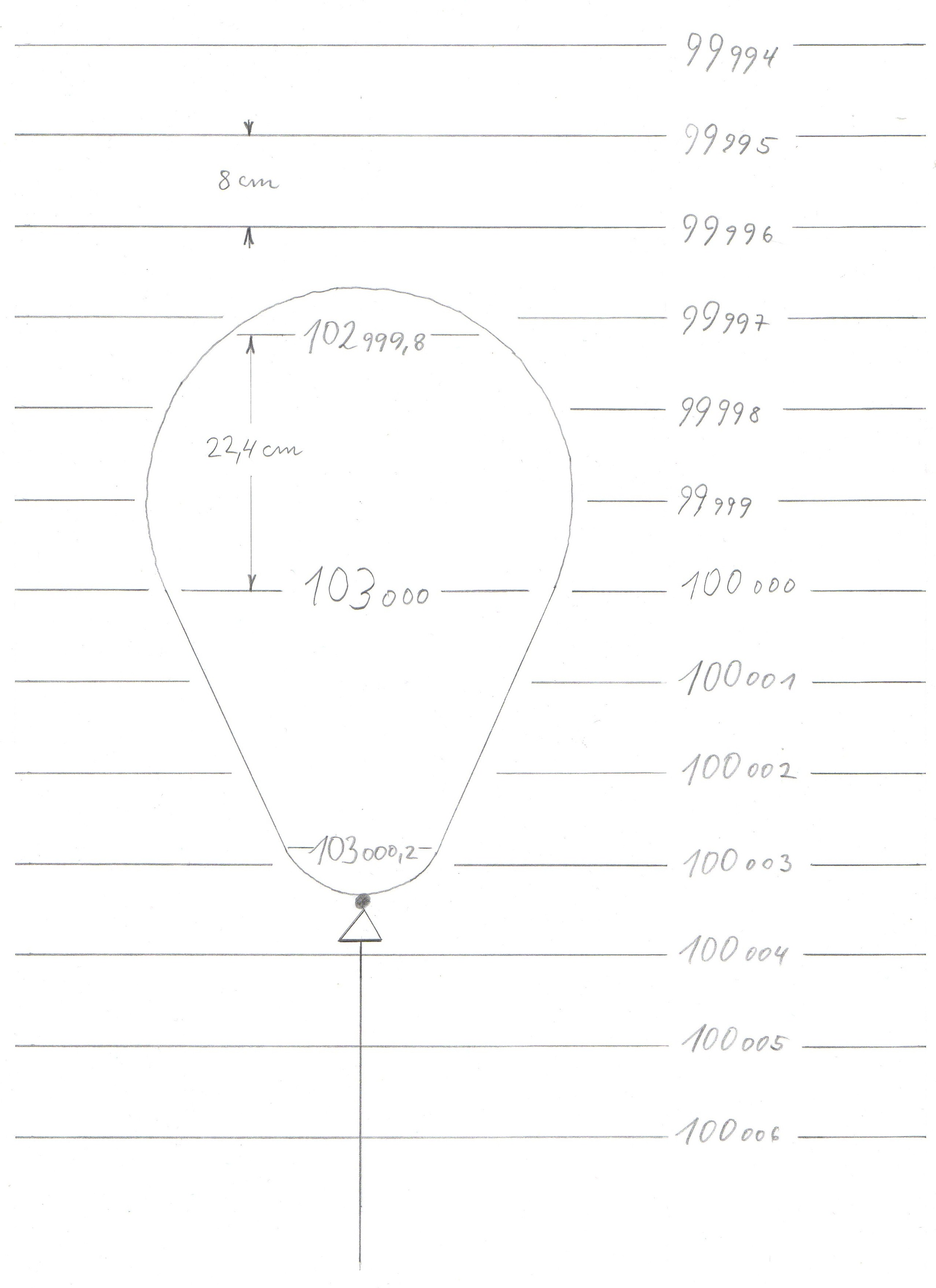 Isobaren sind waagerechte Flächen, die einen Abstand von 8 cm / Pa haben. Die stehen im Fahrgastraum eines PKW bei Kurvenfahrt genauso schräg wie die Wasseroberfläche in der Trinkflasche (Auftrieb und Tragkraft ziehen gegen die Richtung des Scheinlots. Ebenso wird die Flamme des Feuerzeugs in Richtung Kurvenmittelpunkt verbogen.). Da Luft 14 mal so schwer wie Wasserstoff (7 mal so schwer wie Helium) ist, haben die Isobaren im Ballon einen Abstand von (14 x 8 =) 112 cm / Pa. Die gespannte Gummihaut verursacht im Ballon einen Überdruck von 3.000 Pa. Im unteren Teil des Ballons ist der Überdruck 103.000,2 Pa - 100.003 Pa = 2.997,2 Pa, oben sind es 3.002,8 Pa. Die Differenz von 5,6 Pa liefert die Tragkraft. Diese geringe Differenz wird von der gespannten Gummihaut überlagert und ist nicht sichtbar, wohl aber bei einem teilgefüllten Freiballon Hier ist der Wechsel von Unterdruck (der Ballon wird zusammengedrückt) zu Überdruck (der Ballon wird aufgebläht) deutlich sichtbar. Beim kleinen wie beim großen Ballon gilt: Alle (112 x 8 / (112 - 8) = ) 9 cm steigt der Überdruck im Ballon um 1 Pa. Das Volumen ist 34 l, der Auftrieb 0,44 N (44 g), die Tragkraft 0,41 N (41 g). Der Kegelstumpf wird mit 340 N (34 kg) nach unten, die Halbkugel mit 340,41 N (34,041 kg ) nach oben gedrückt.